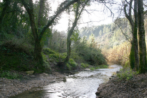 Vue de la Vallée de Lapedo